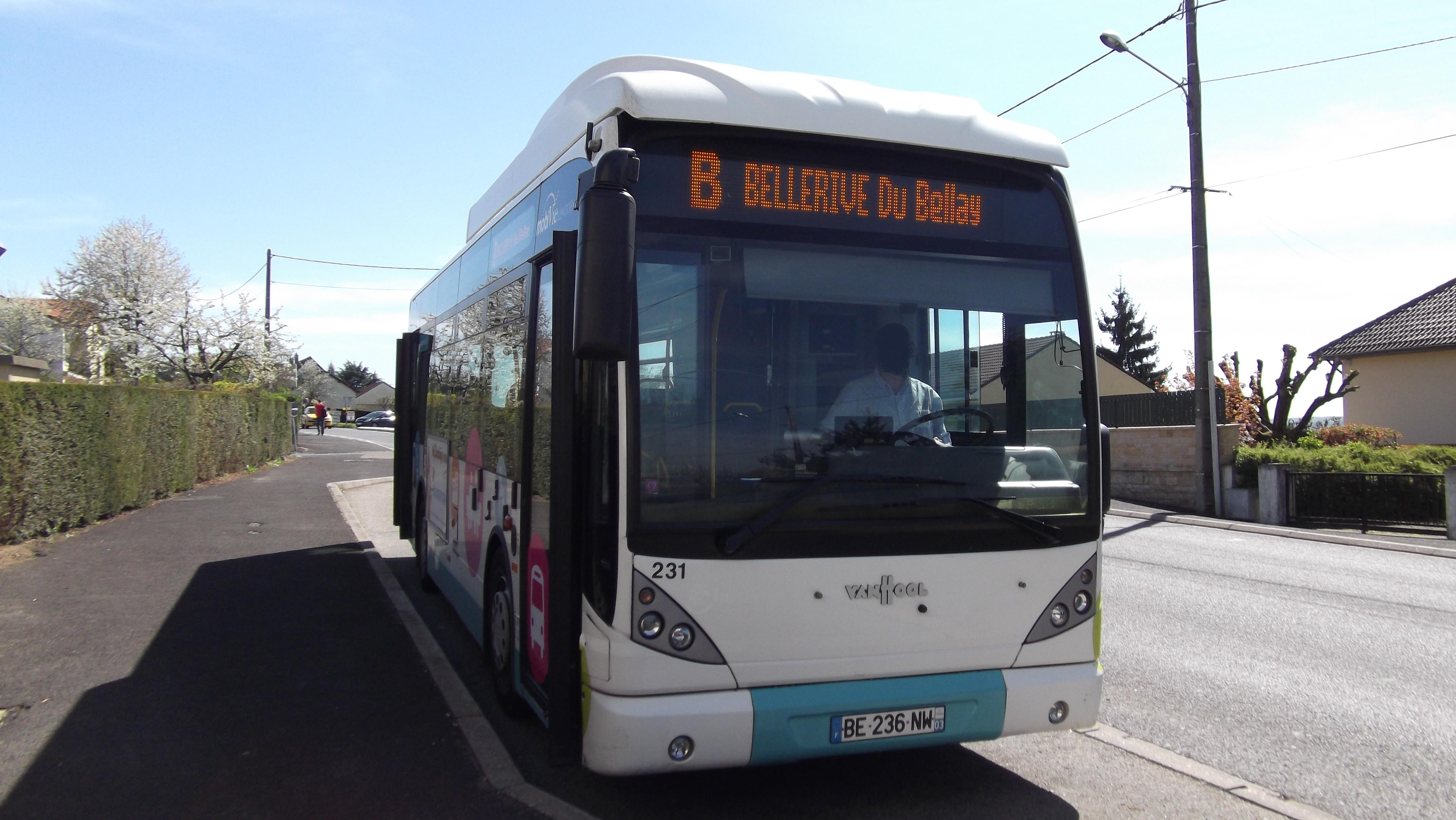 VanHool New A308 n°231 du réseau MobiVie de Vichy, affecté sur la ligne B en direction de Bellerive du Bellay.